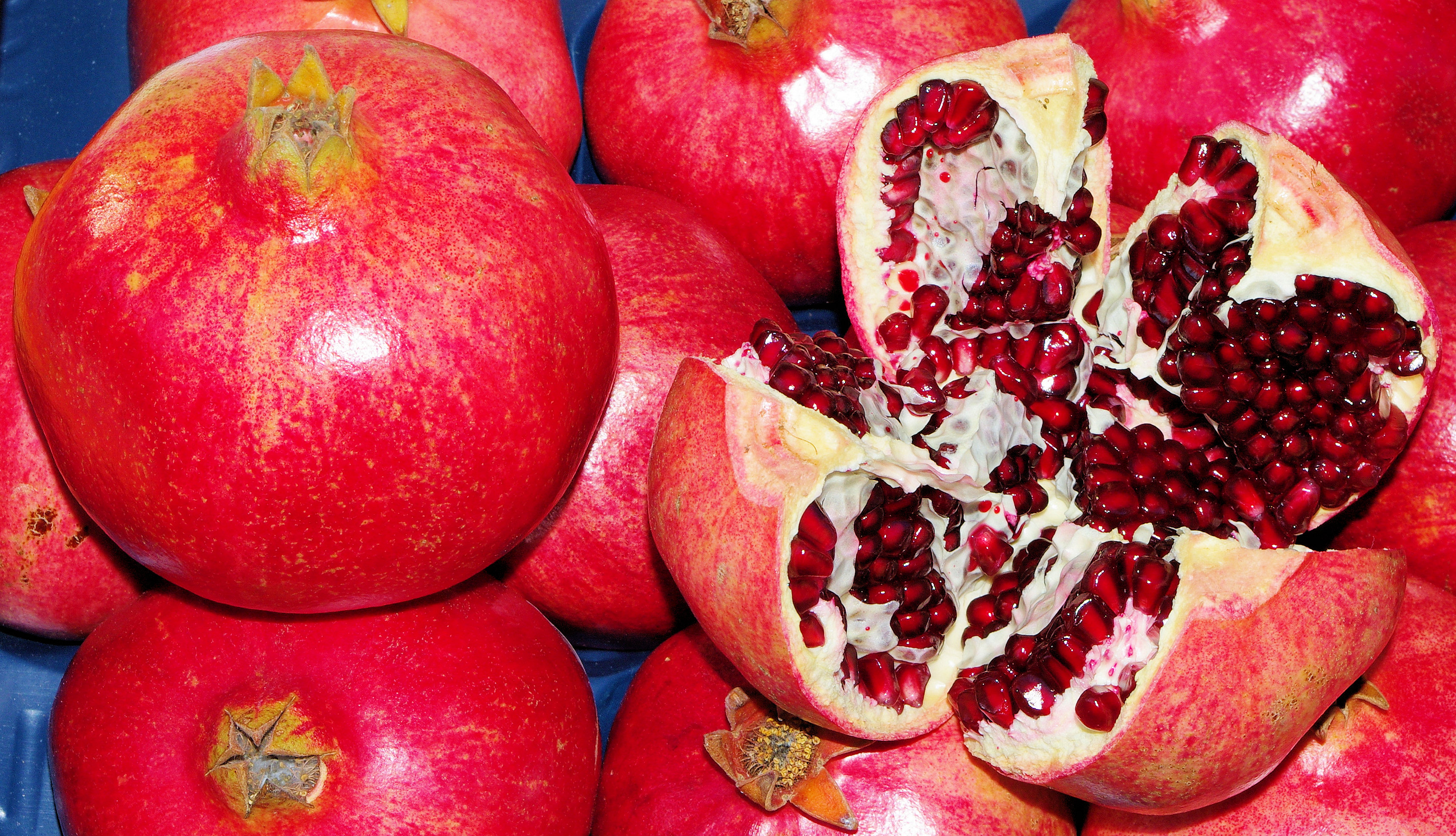 Granatäpfel